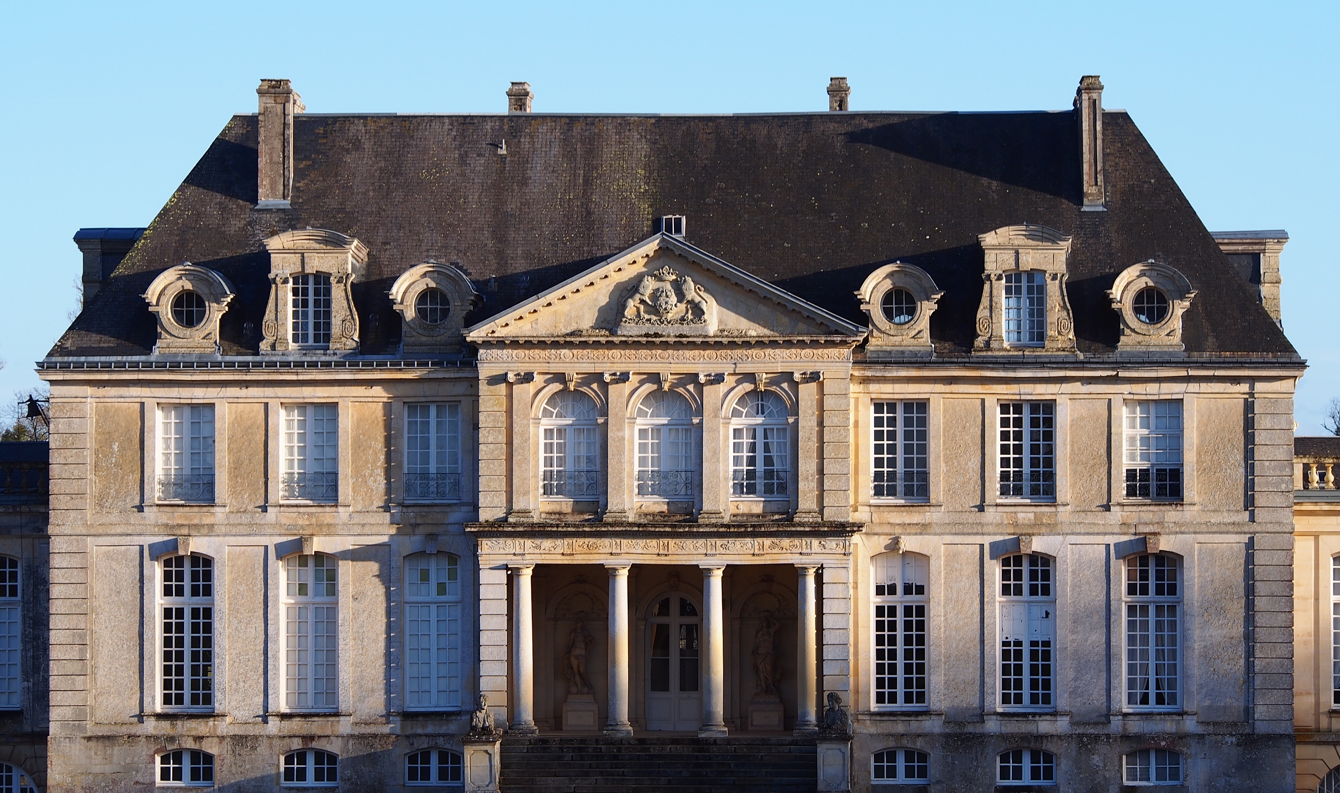 Versainville (Normandie, France). La façade principale du château.